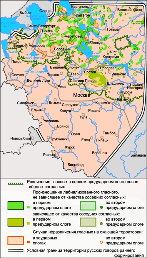 Карта произношения лабиализованных гласных и случаев неразличения второго предударного и заударных слогов в русских окающих говорах. Источники: Захарова К. Ф., Орлова В. Г., Сологуб А. И., Строганова Т. Ю. Образование севернорусского наречия и среднерусских говоров / Ответственный редактор В. Г. Орлова. — М.: «Наука», 1970. — С. 146 (Карта 39. Вокализм 1-го предударного слога после твёрдых согласных), С. 149 (Карта 40. Вокализм 2-го предударного и заударных слогов после твёрдых согласных).